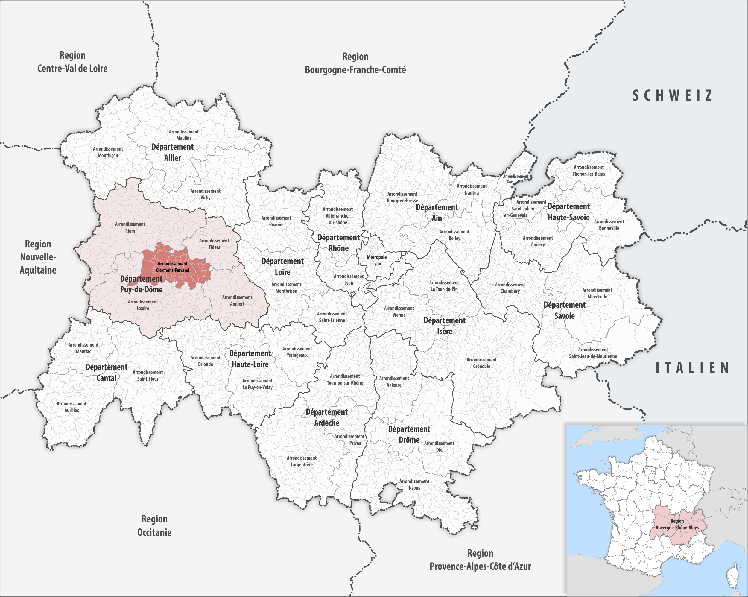 Lage des Arrondissements Clermont-Ferrand